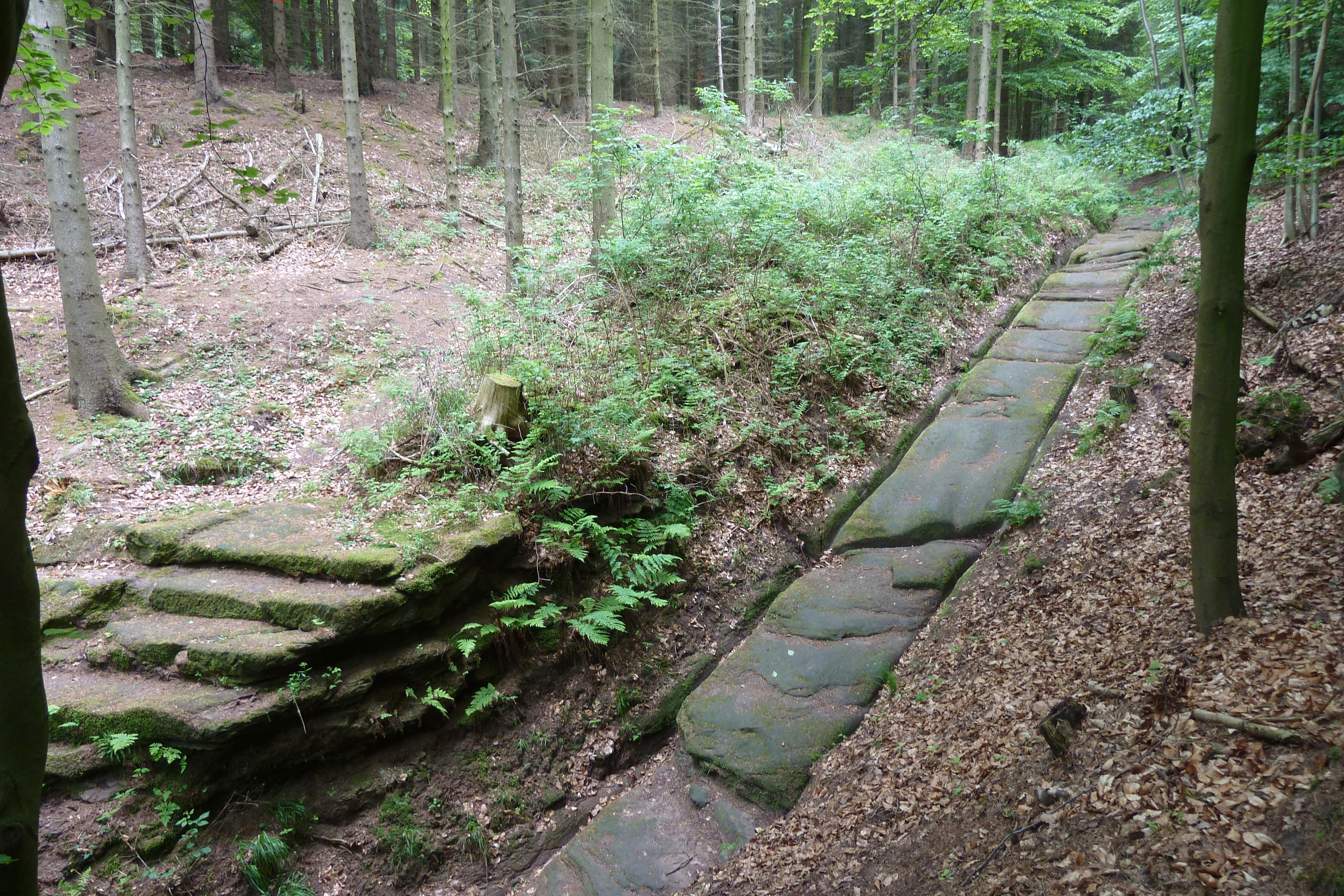 Iliantreppe an der Hohen Steyer im Nörtener Wald nahe Bishausen, Südniedersachsen. Teil eines mittelalterlichen Transportweges zwischen Nörten-Hardenberg und Billingshausen unter Umgehung der plessischen Gebiete im Rodetal. Rechts (vorn) im Bild die Fahrspur mit eingefahrenen Radspuren, links die Treppe des Fußwegs der Fuhrleute.